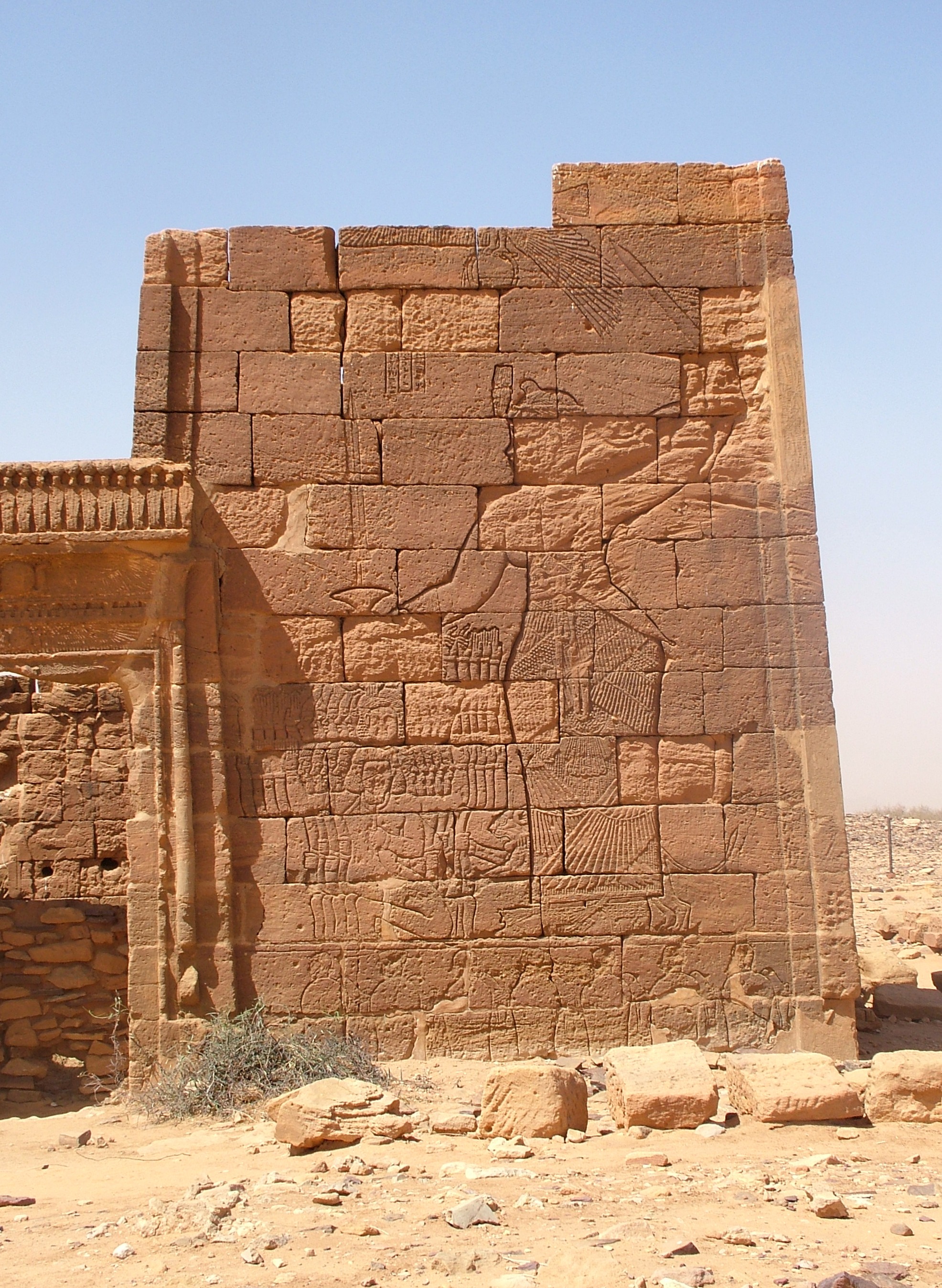 Amanitore